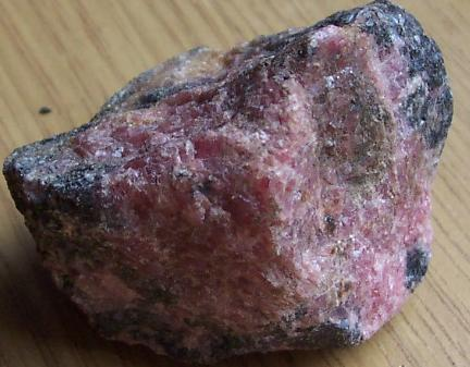 minerał; rodonit, pochodzenie Madagaskar, autor zdjęcia Sebastian Socha; 05.08.2006r.